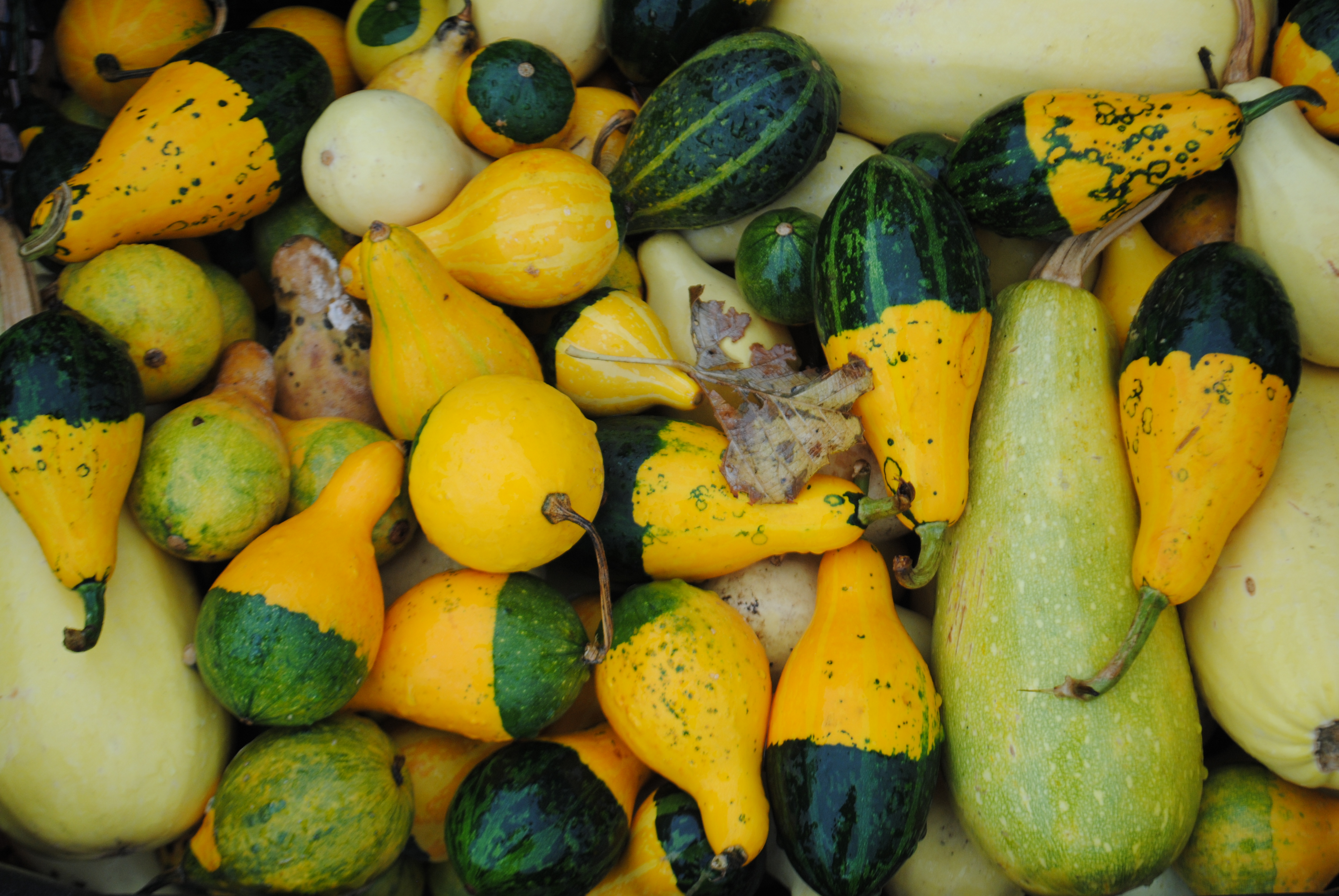 Amasra'dan çeşitli görüntüler